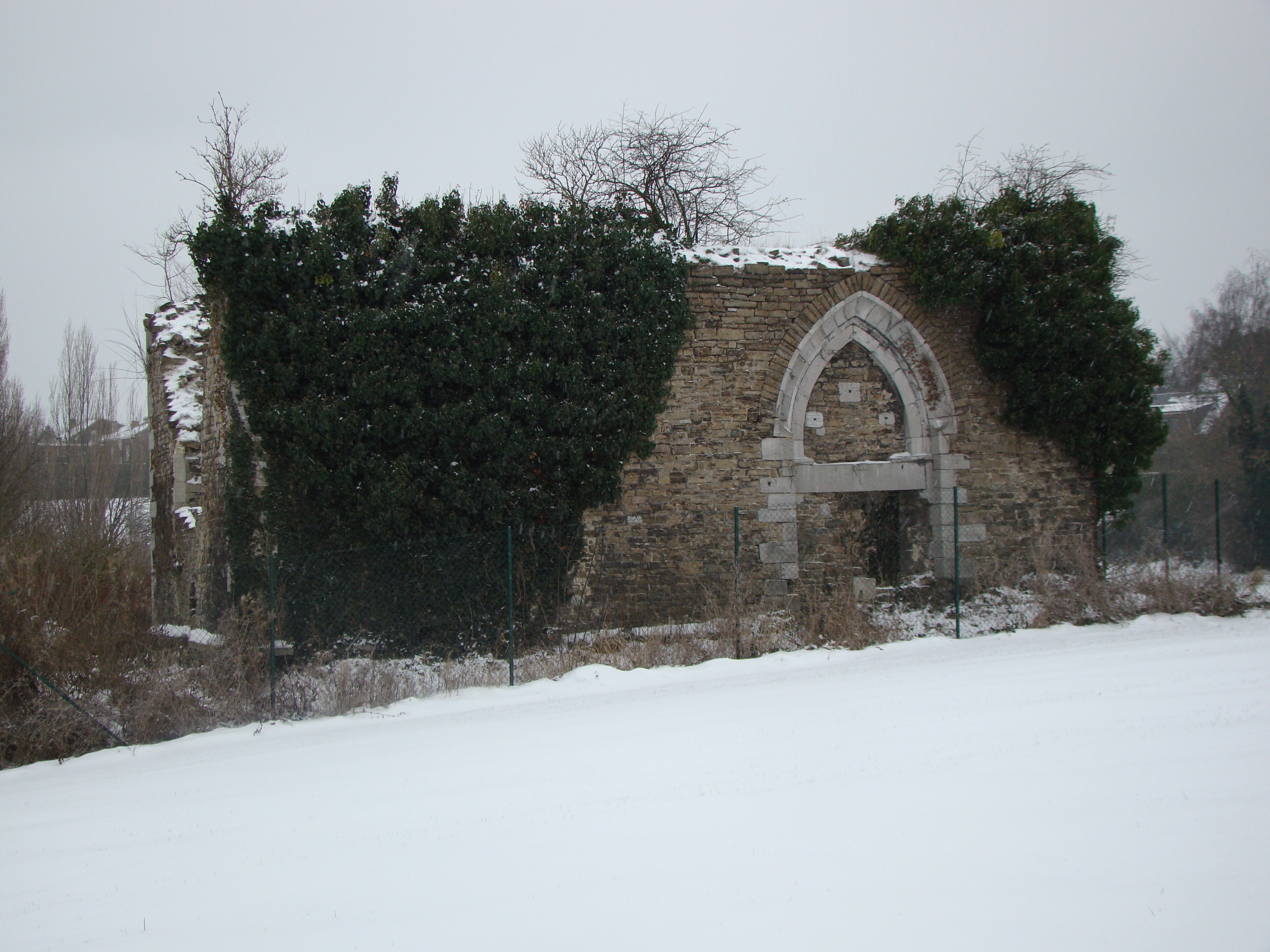 Ruines de l'ancienne chapelle du château de Bouxthay sises chaussée de Brunehaut